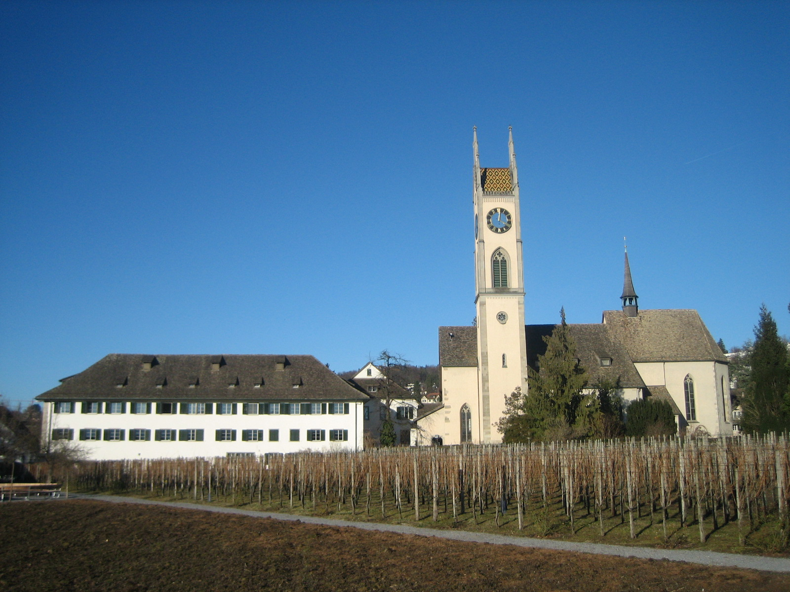 Kirche Küsnacht, links Hauptgebäude der Kantonsschule